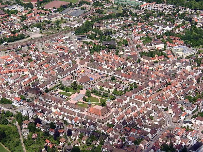 Luftaufnahme: Freudenstadt